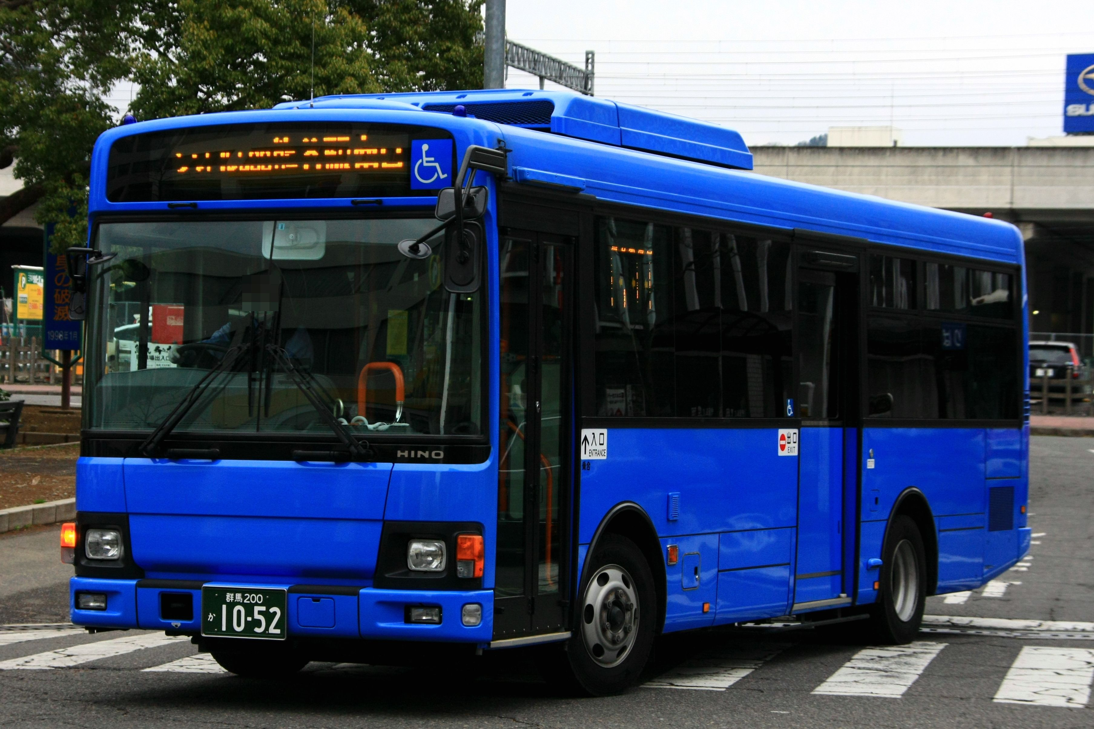 株式会社矢島タクシーが太田駅南口～熊谷駅南口間で運行している路線バス「おおたCityシャトル500」。またそれに使用される日野・レインボーⅡ。